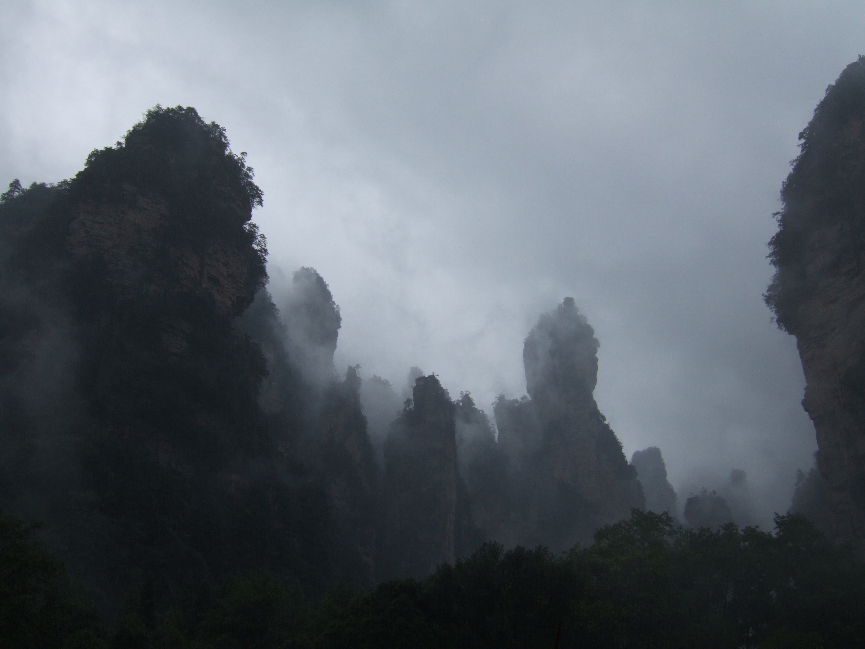 Berge im Tianzi Gebirge (China, Provinz Hunan). Mögliche Artikelverwendung: China, Hunan, Tianzi Gebirge.